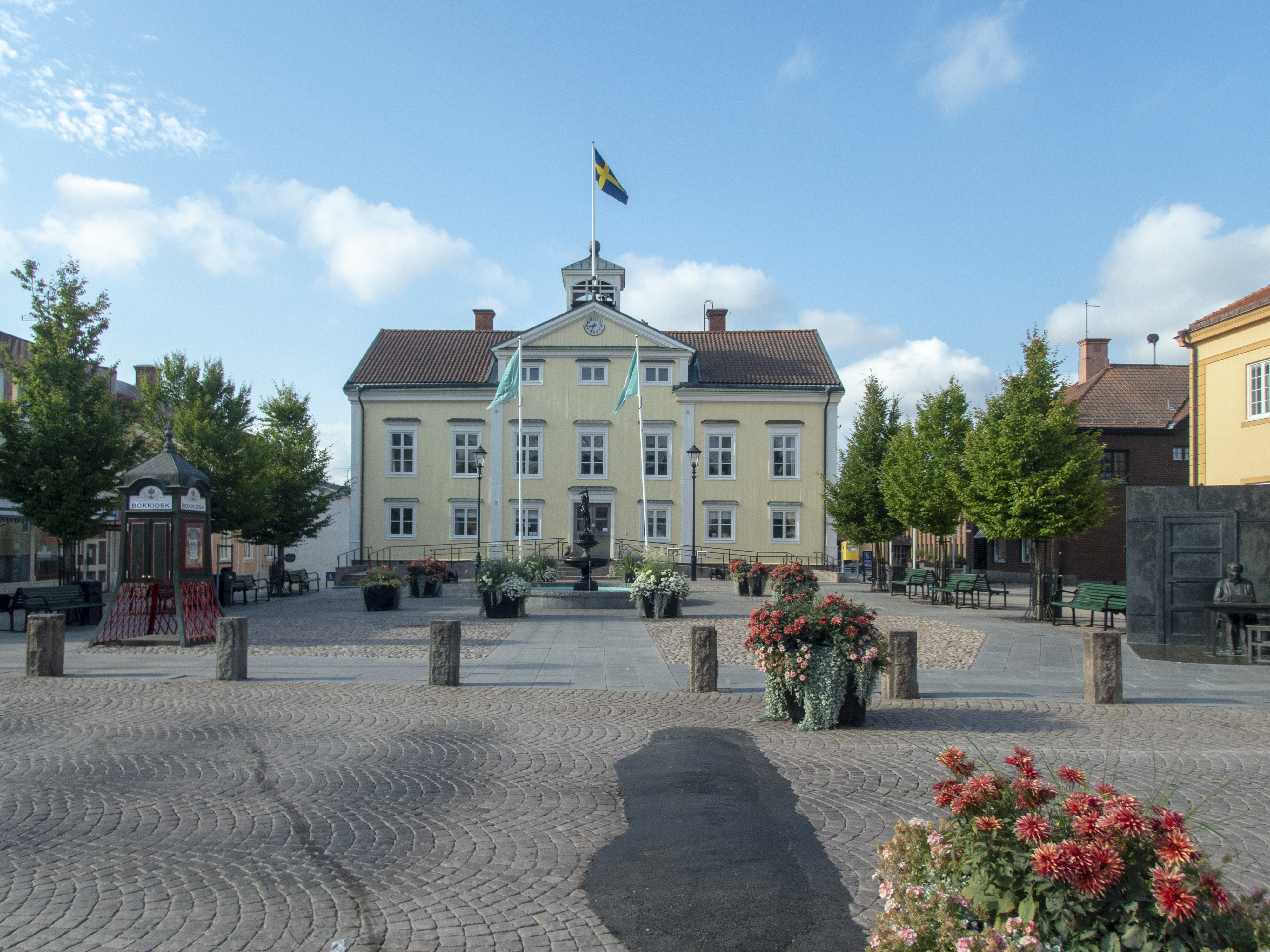 Rådhuset i Vimmerby. Byggnadsår 1824 - 1825. Arkitekt Jacob Wilhelm Gerss.Byggnaden fungerade som rådhus mellan åren 1825 - 1948.